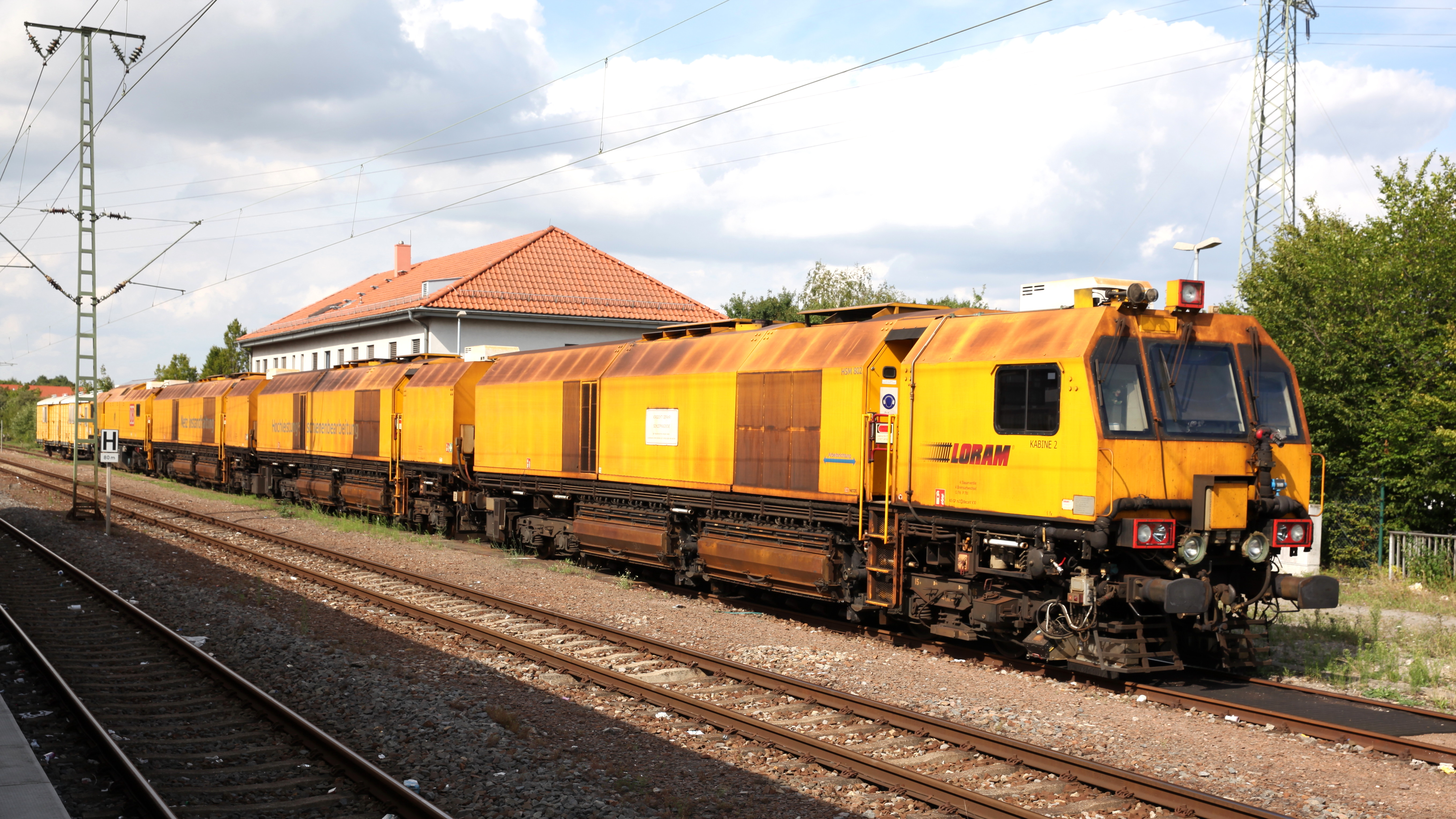 Loram Hochleistungs-Schienenschleifmaschine im Bahnhof Graben-Neudorf